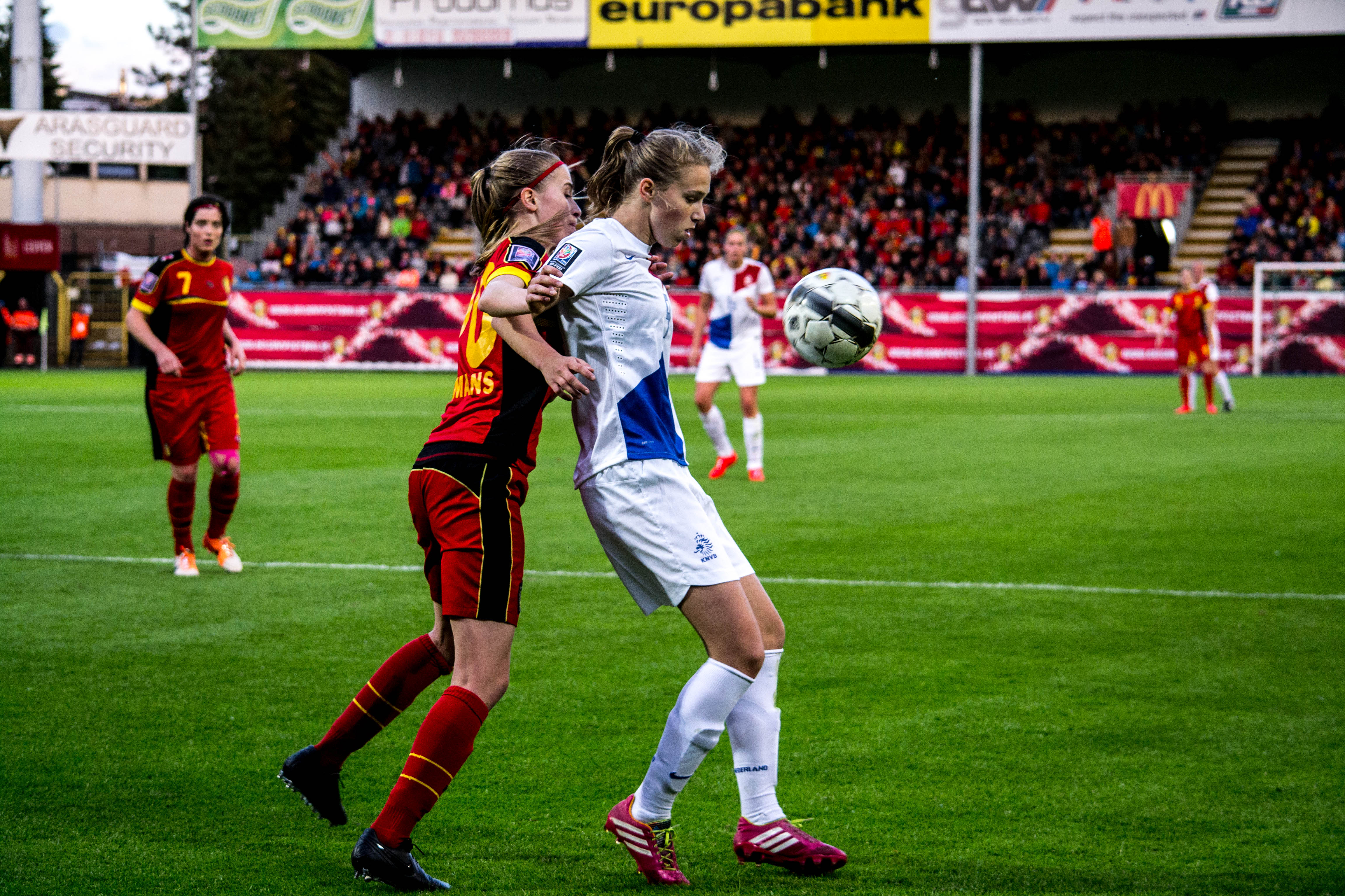 StampMedia